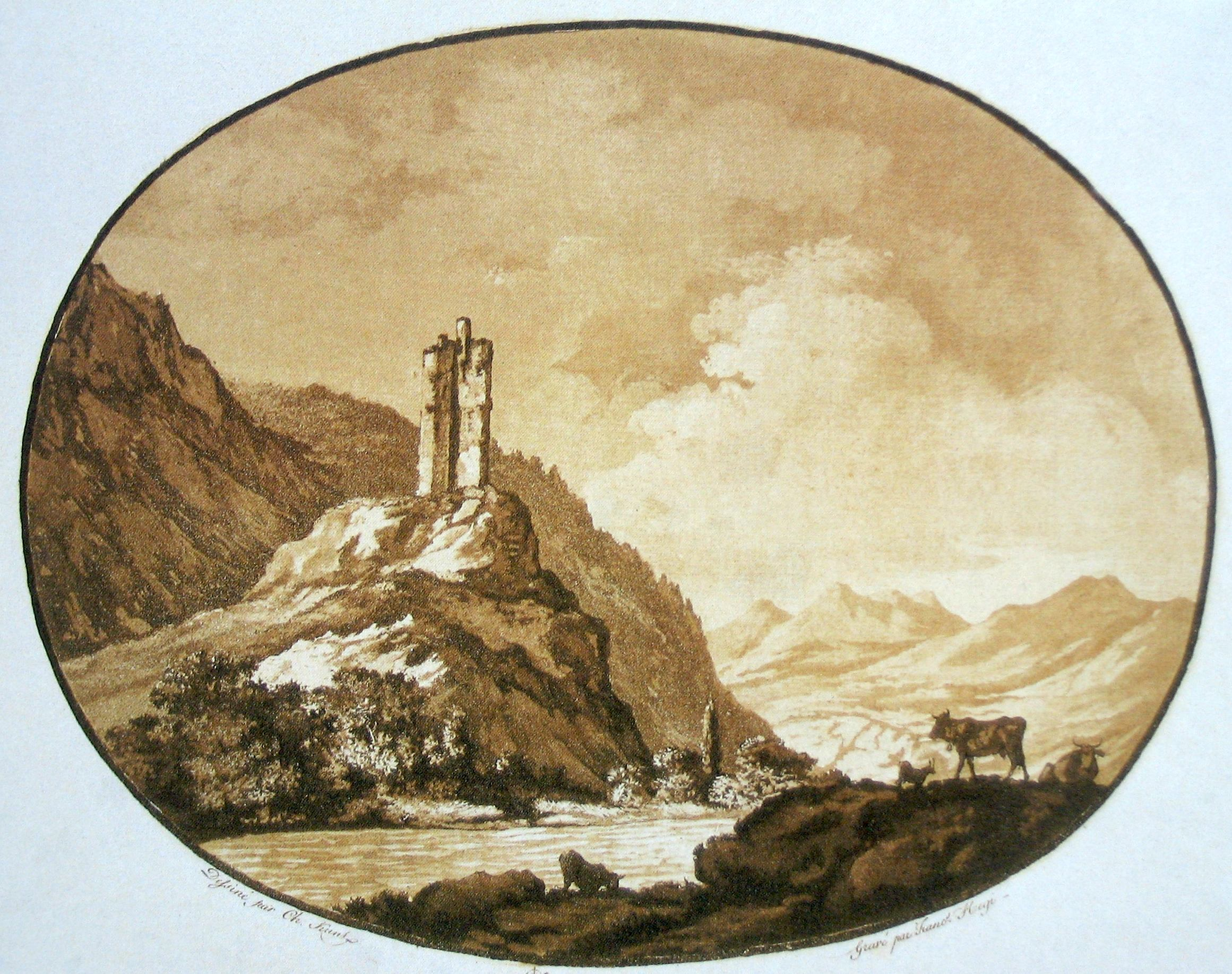 heute verschwundene Ruine der Burg Felsberg um 1791. Aquatinta von Carl Kuntz (1770 - 1803) und Franz Hegi (1774 - 1850)